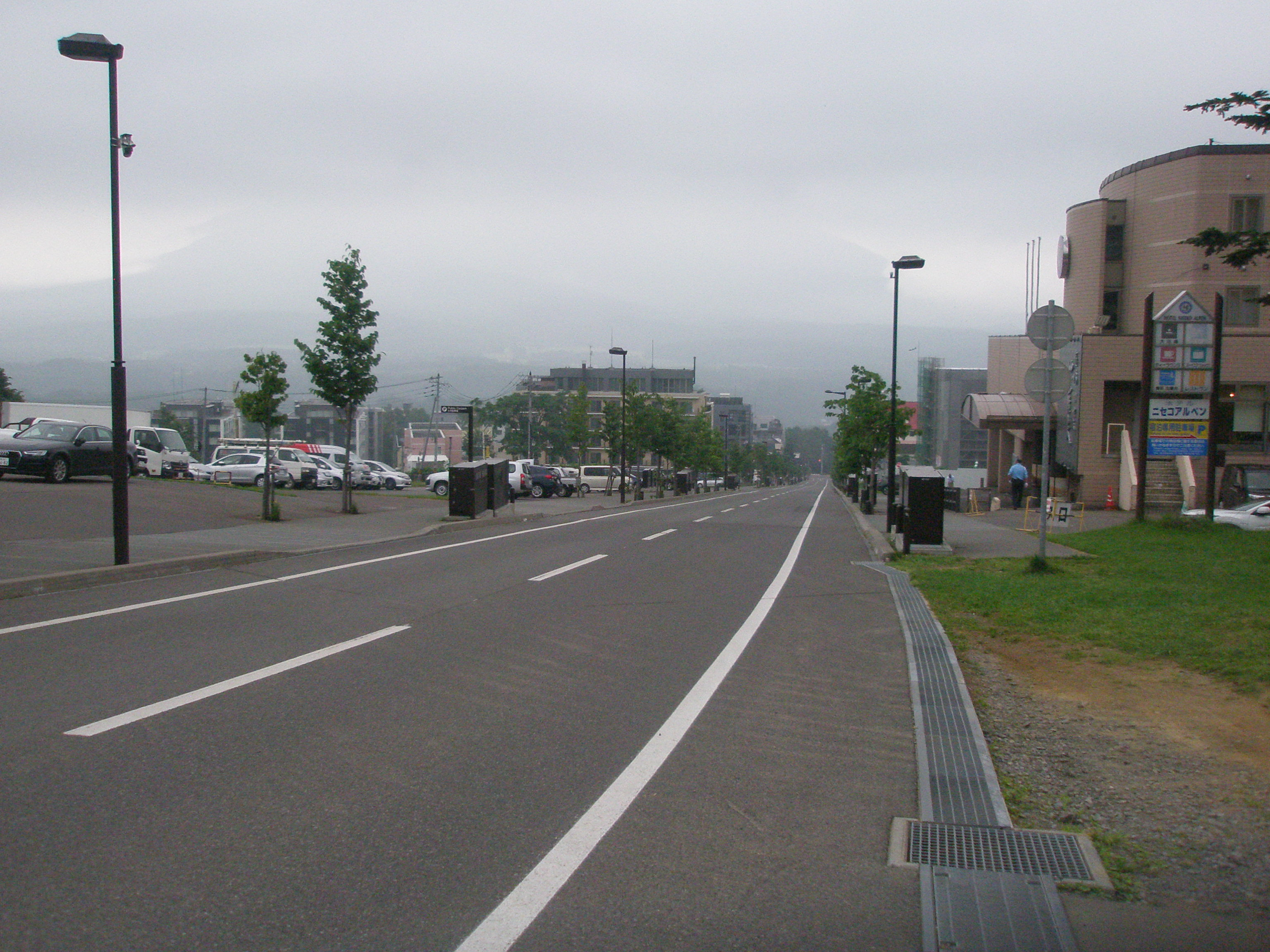 北海道道631号ニセコ高原比羅夫線・本線（起点側・ニセコマウンテンリゾート グラン・ヒラフ .Base付近から、2018年7月撮影））